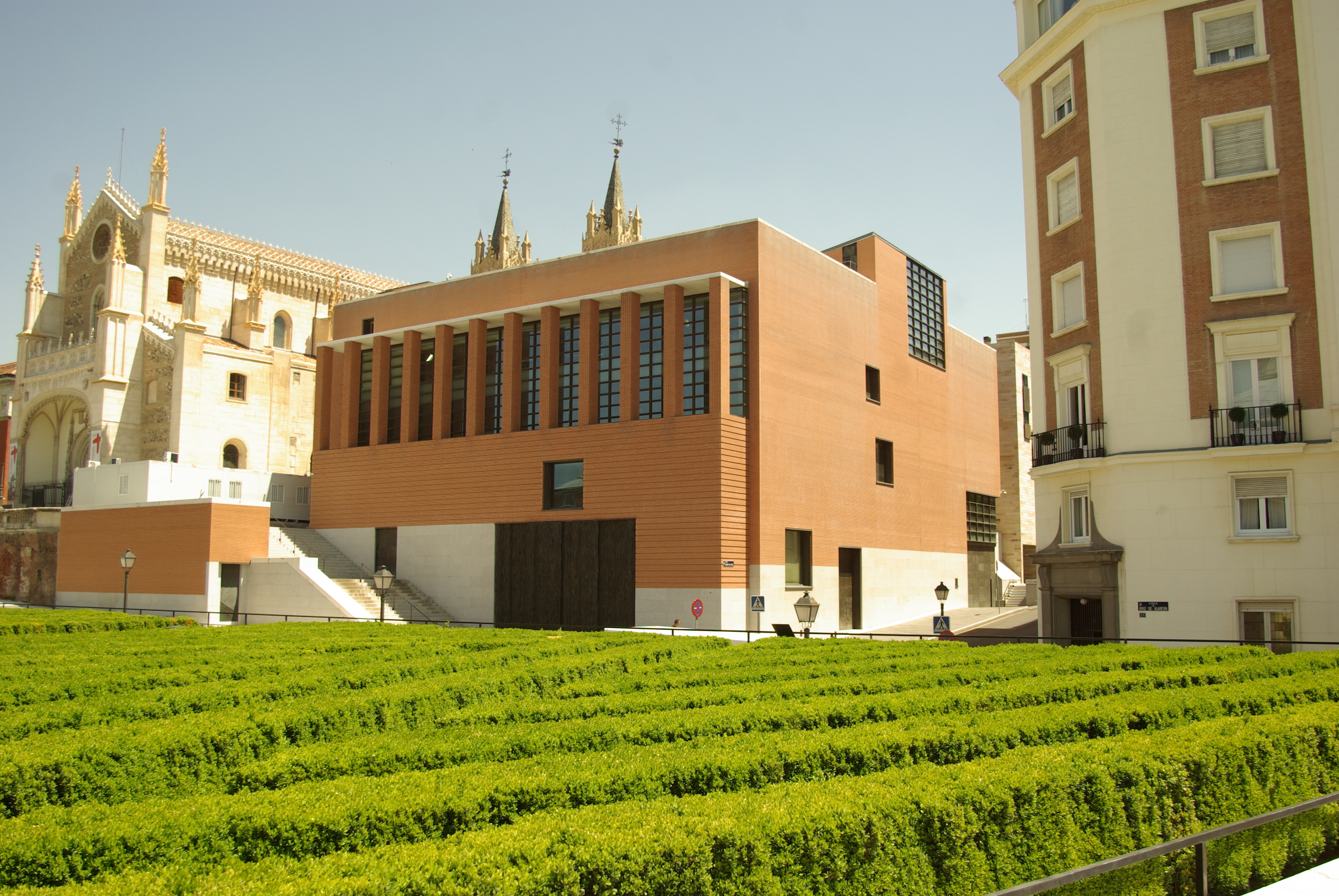 ® MADRID E.U.S. ARTECTURA MUSEO DEL PRADO-PANORAMA